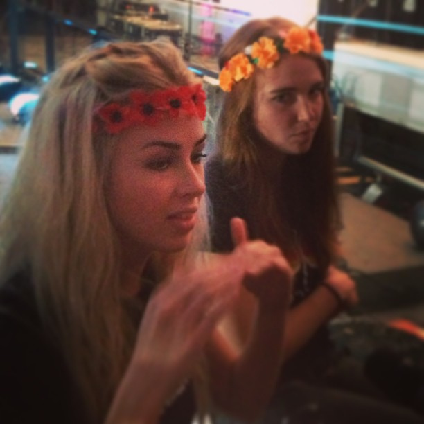 Femen-Aktivistinnen Alexandra Schewtschenko und Josephine Witt 2013 in Genua